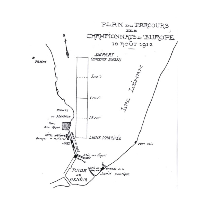 Plan des Championnats d'Europe d'aviron 1912